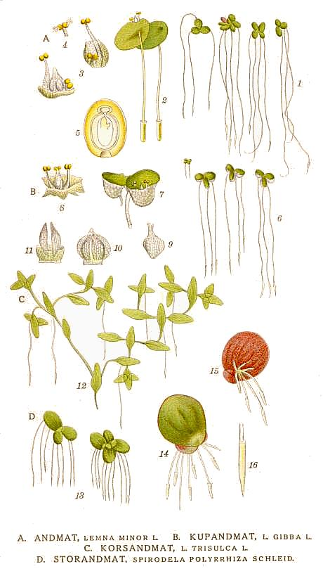 A. Lemna minor L. B. Lemna gibba L. C. Lemna trisulca L. D. Spirodela polyrrhiza (L.) Schleid. Original Description A. Andmat, Lemna minor L. B. Kupandmat, Lemna gibba L. C. Korsandmat, Lemna trisulca L. D. Storandmat, Spirodela polyrrhiza Schleid.